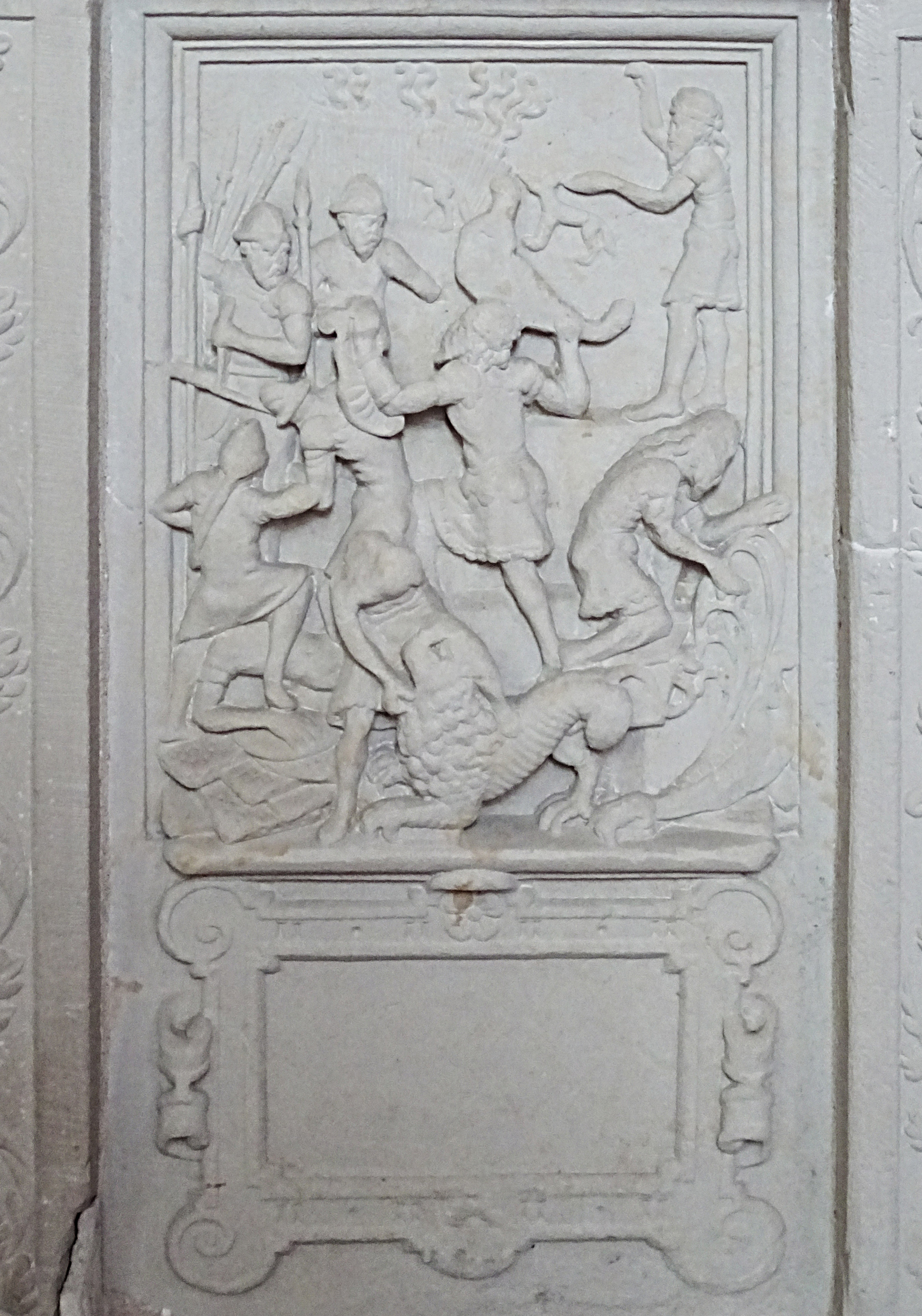 Steinbilderbibel in der St. Annenkirche (Eisleben), 23/29, Simsons Kampf gegen die Philister